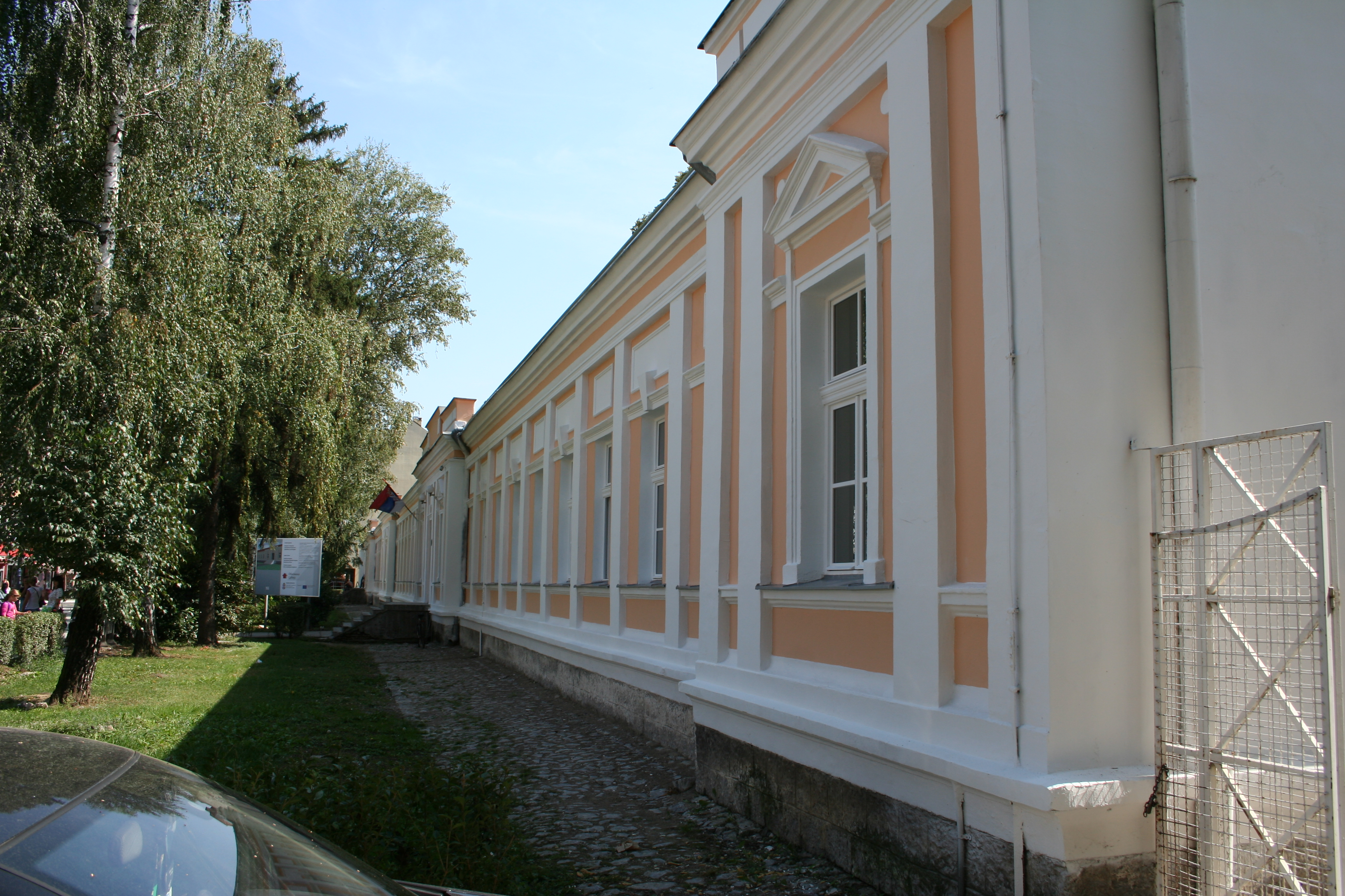 Zgrada Karađorđeva 118-120, Valjevo